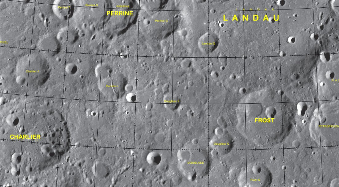 Cráter Charlier (LRO)